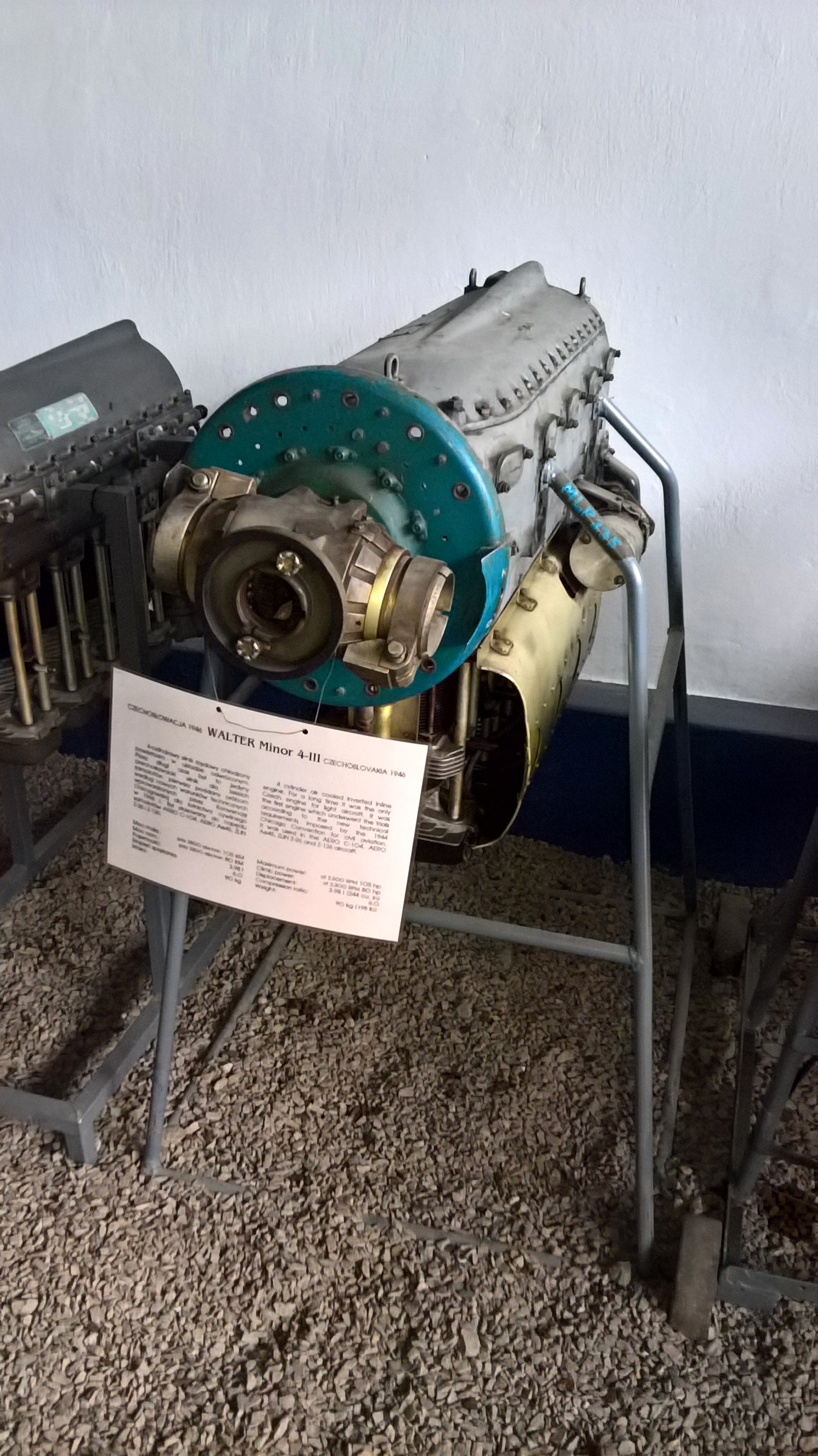 Czechosłowacki 4-cylindrowy silnik rzędowy Walter Minor 4-III z 1946 r. ze zbiorów Muzeum Lotnictwa Polskiego w Krakowie.